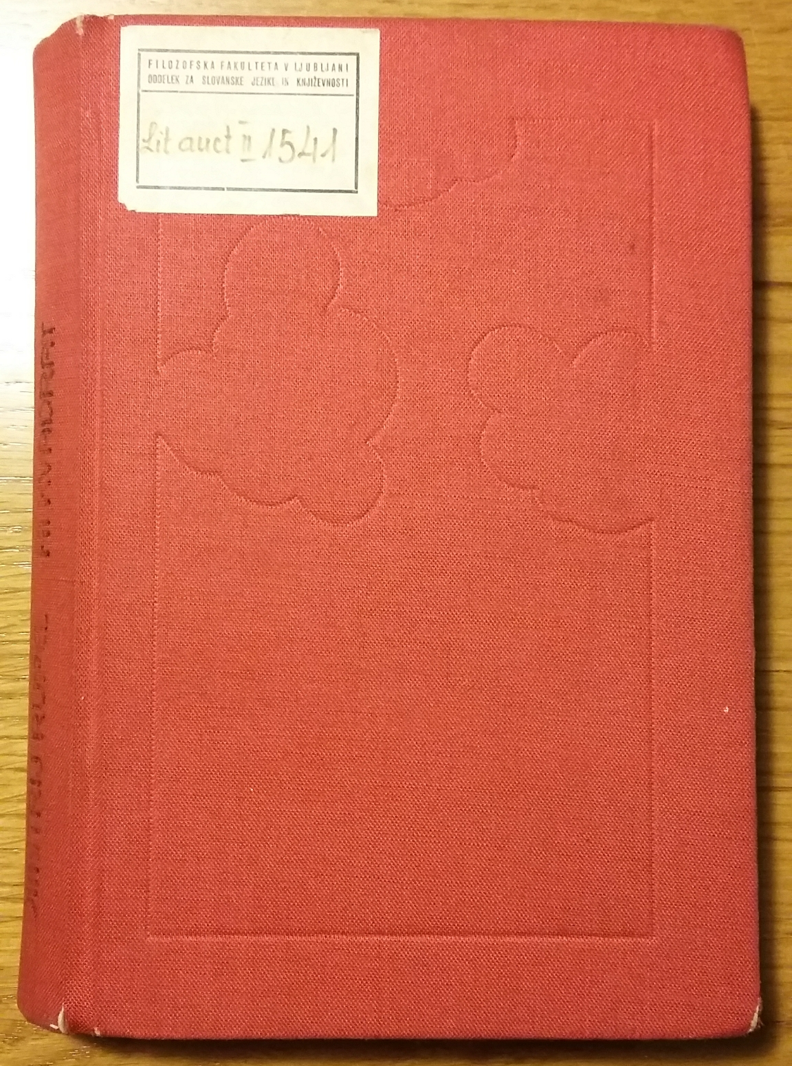 Naslovnica knjige